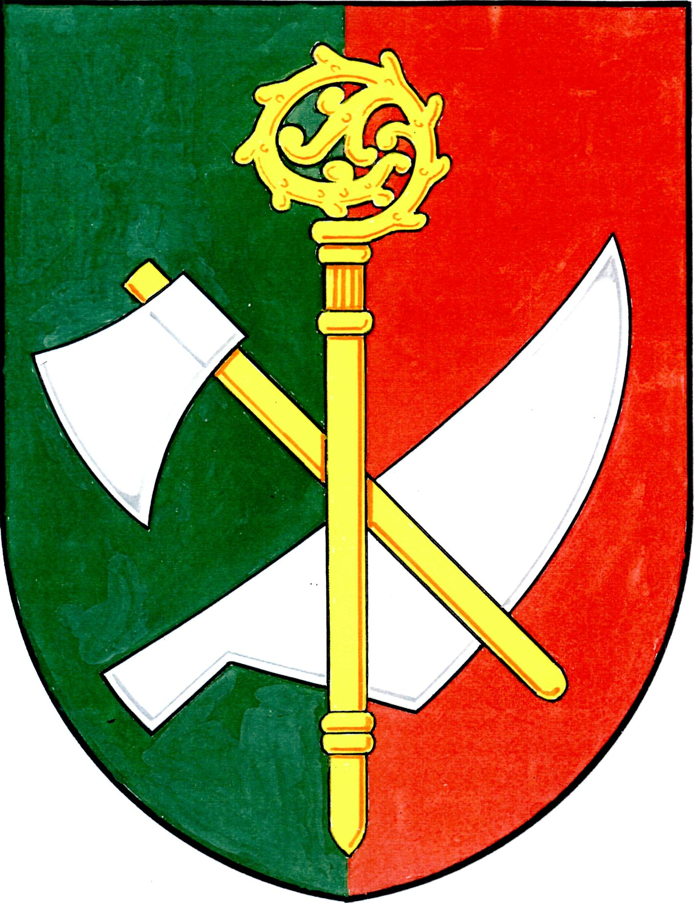 znak obce Doloplazy